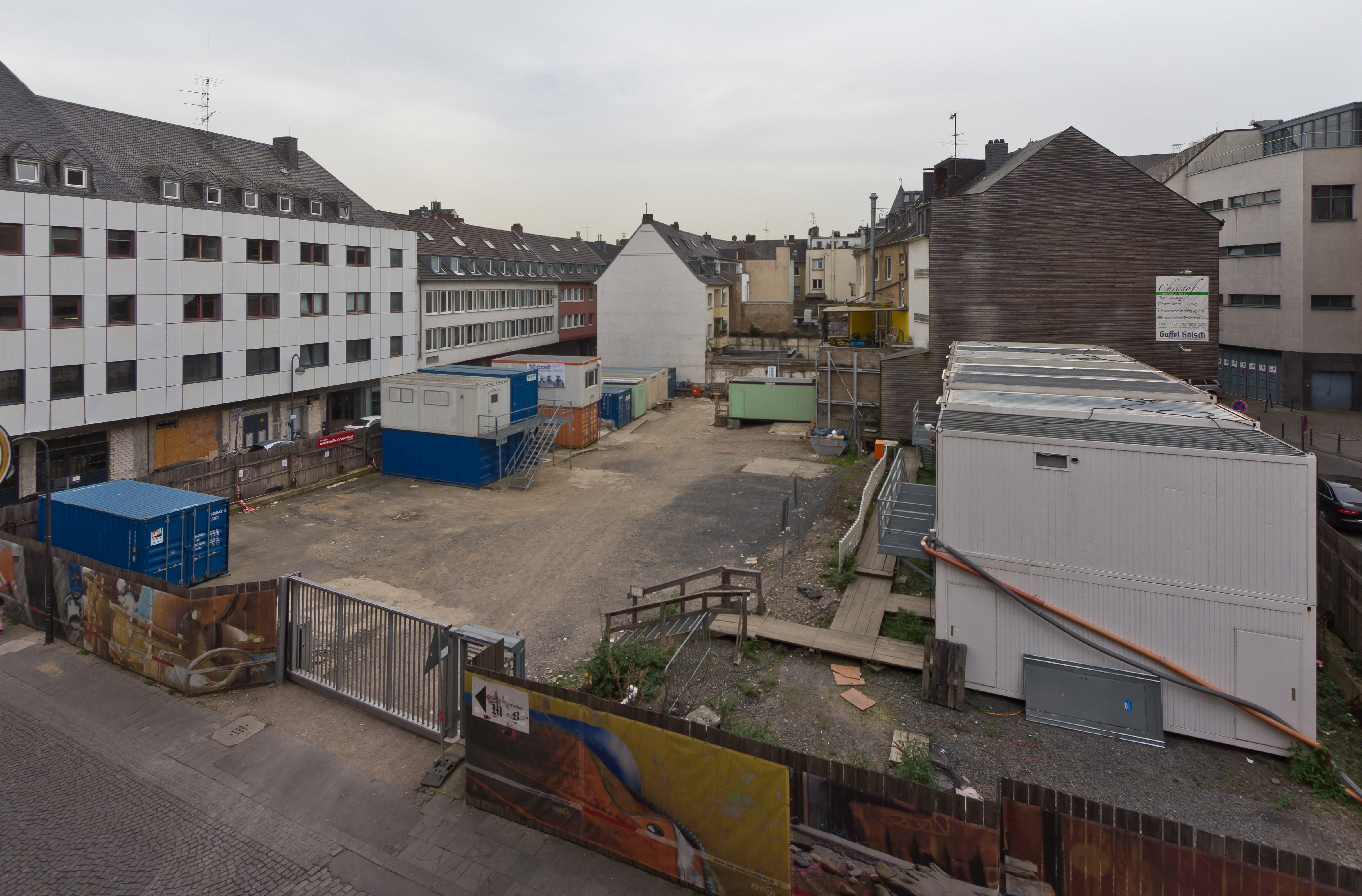 Gelände des ehemaligen Kaufhaus Kutz, Köln; Ansicht von Norden aus dem Verwaltungsbau des Historischen Rathaus am Marsplatz. Links: Steinweg: Rechts: Martinistraße. Hier soll der Erweiterungsbau zum Museum Wallraf errichtet werden. Das Foto zeigt noch (Büro)Container von der Nord-Süd-Bahn-Baustelle der letzte Jahre.